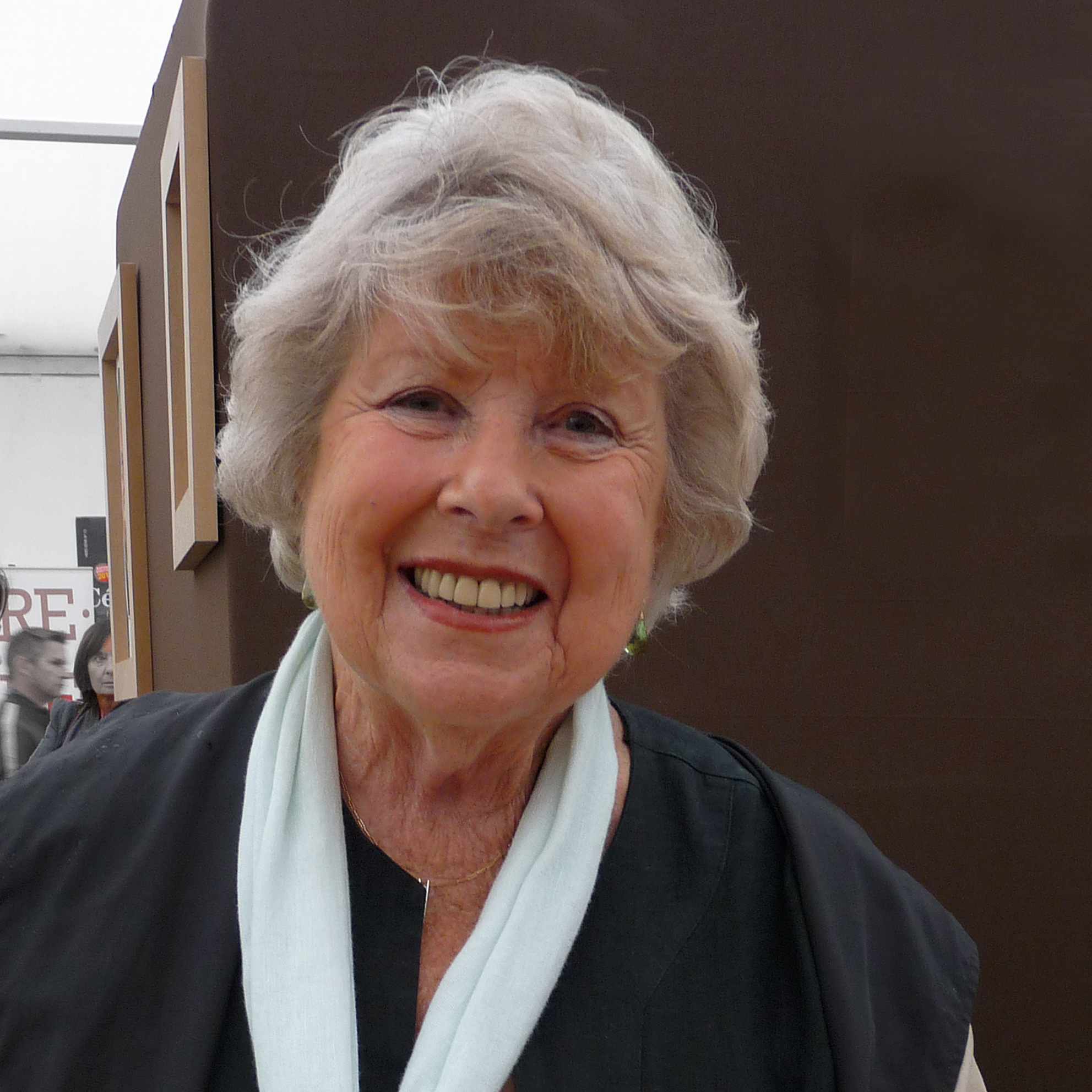 Christiane Collange en dédicace au "Livre sur la Place", Nancy, septembre 2011